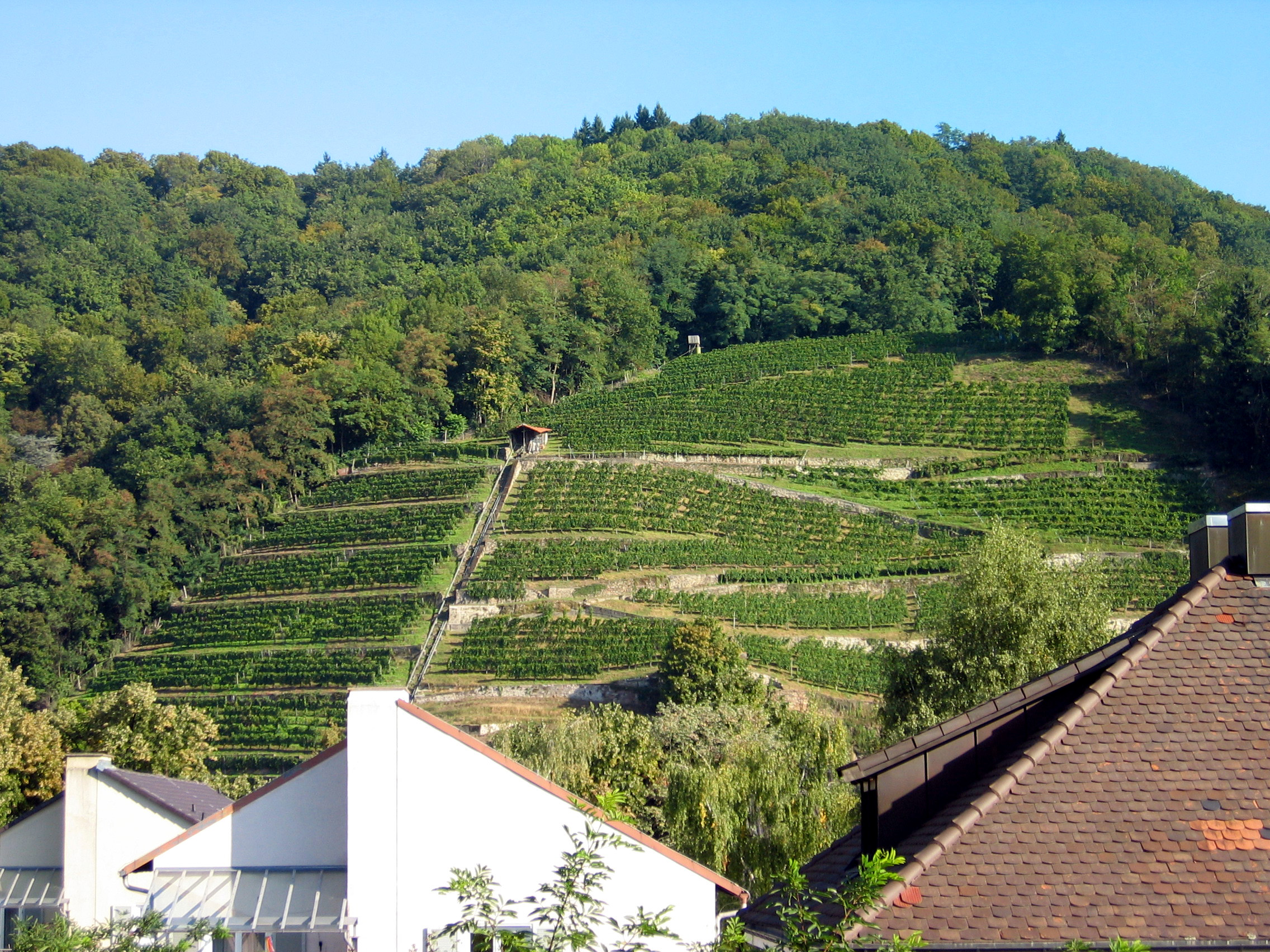 Weinberg am Schlossberg (Freiburg im Breisgau) im Stadtteil Freiburg-Oberau